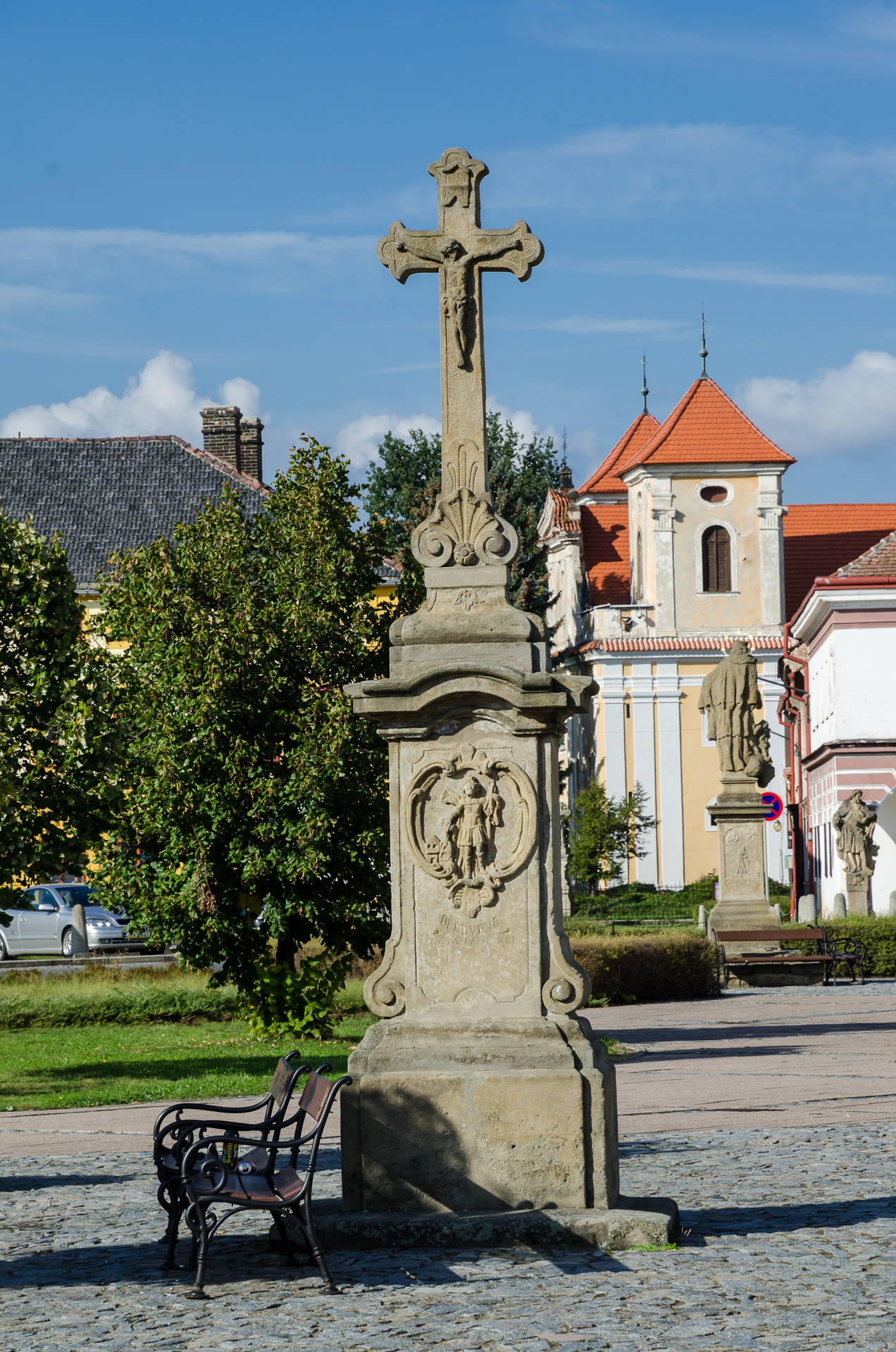 Krucifix (Dašice), nám. T. G. Masaryka, Dašice